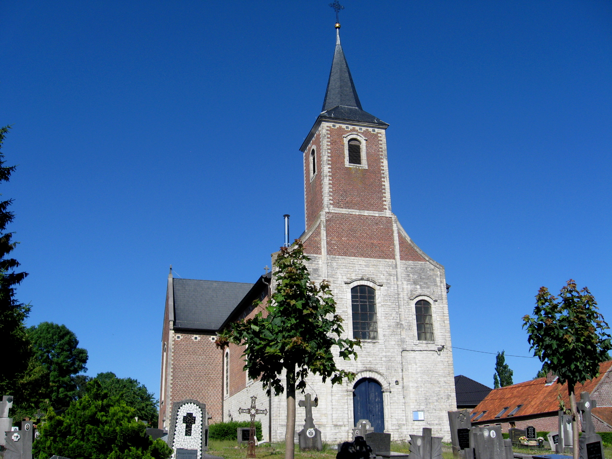 Sint-Remigiuskerk in Neervelp